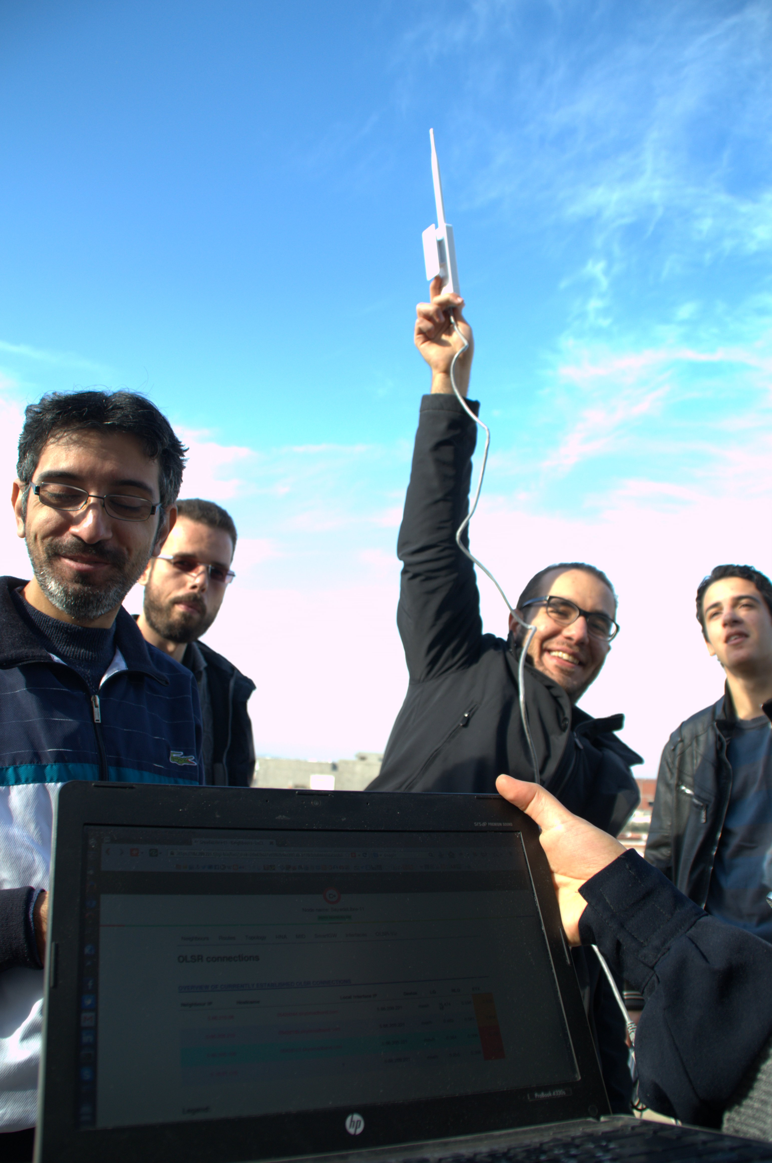 Atelier pour l'installation et la configuration d'un Mesh Networking dans la ville de Sayada en Tunisie